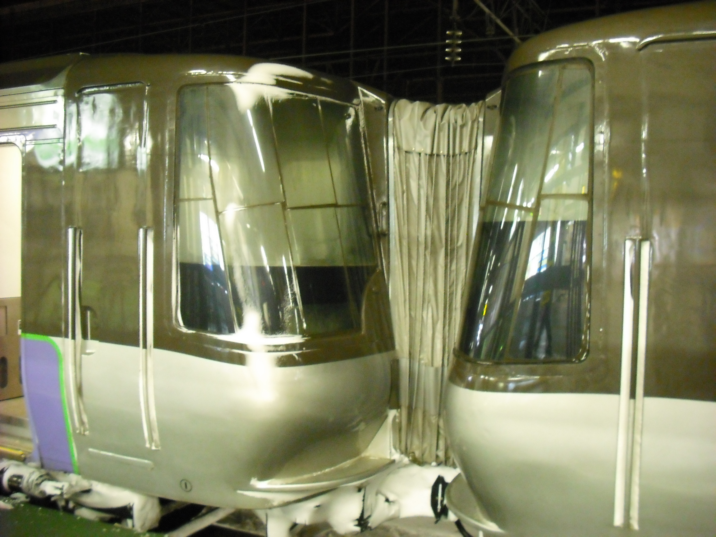 旭川駅1番ホームにて 785系先頭車を中間車に改造した例 機器類を撤去し運転室を閉鎖、ガラスにはフィルムを貼っているのが確認出来る。